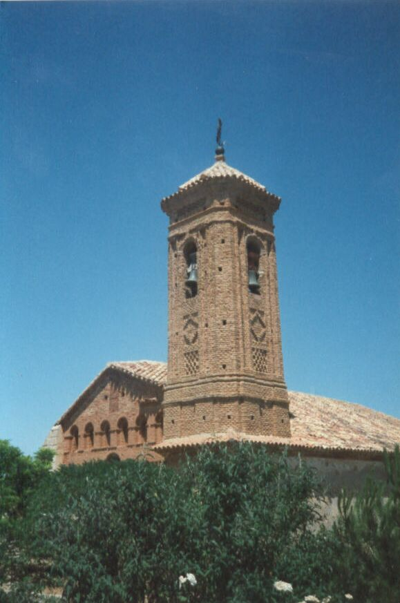 Torre de la Iglesia de Santa María Magdalena (s.XV) de Villahermosa del Campo (Teruel)